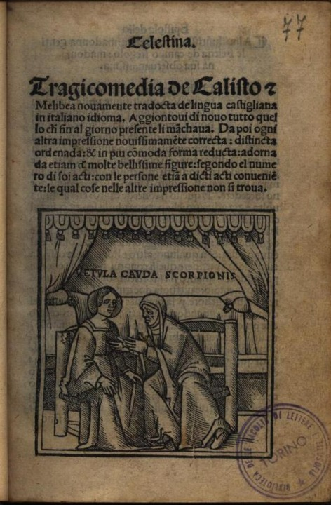 Portada de la edición de la traducción italiana de Celestina de Venecia, Cesare Arrivabene, 1519. Reproducción del ejemplar conservado en la Università degli Studi di Torino.